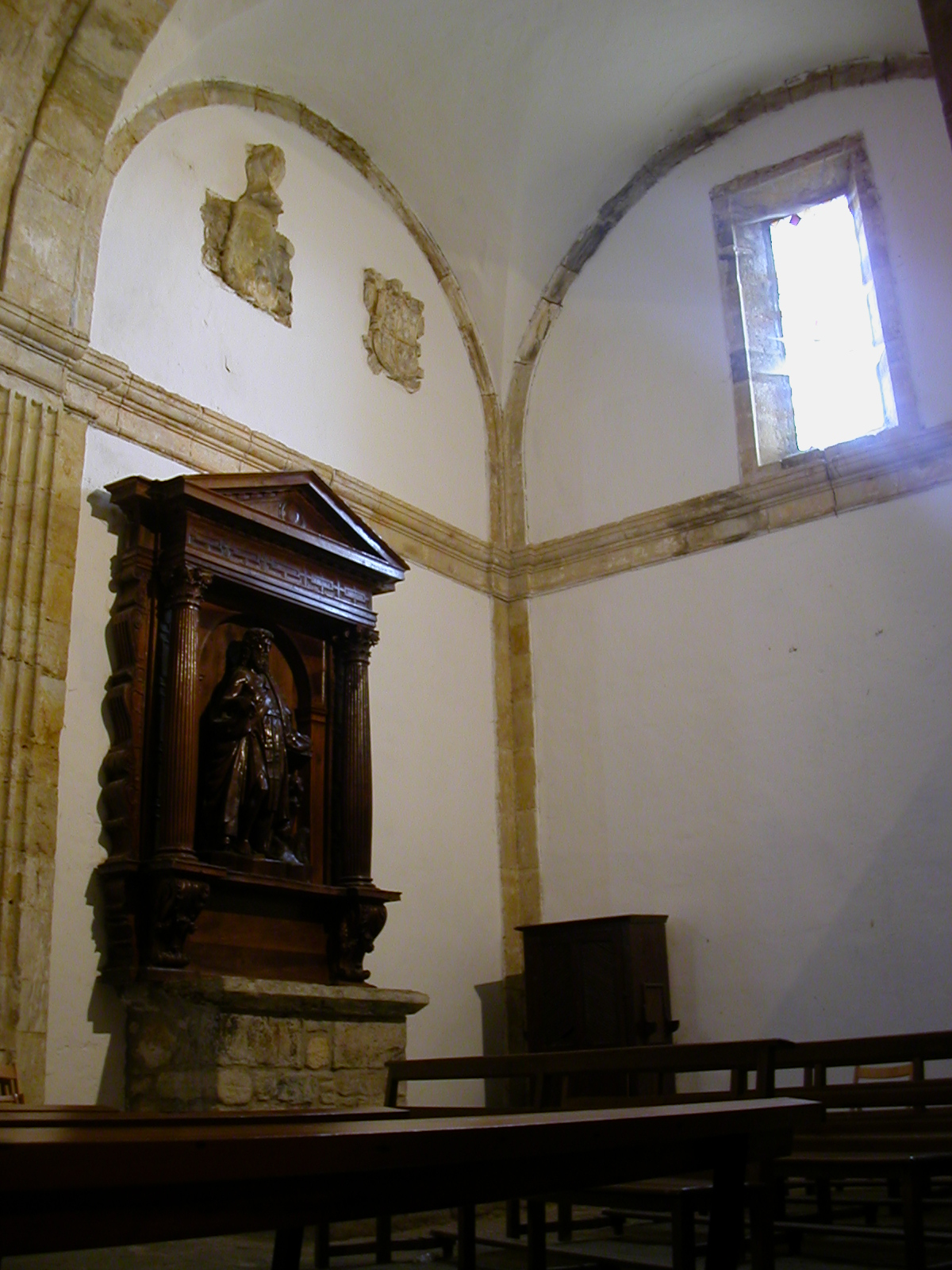 Capilla de Agustina de la Iglesia Santa Maria de Carasa